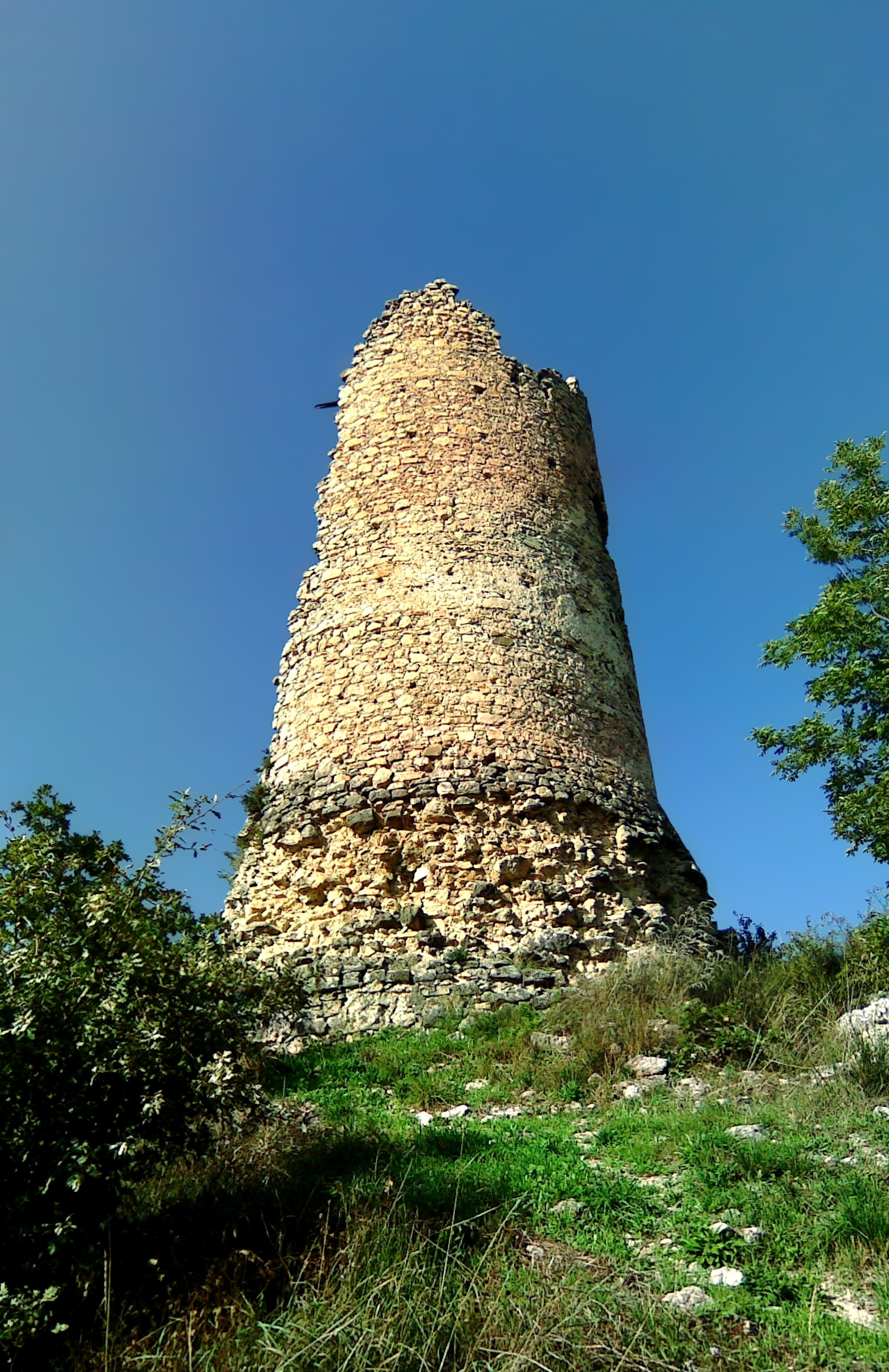 Giuseppe Bernardini